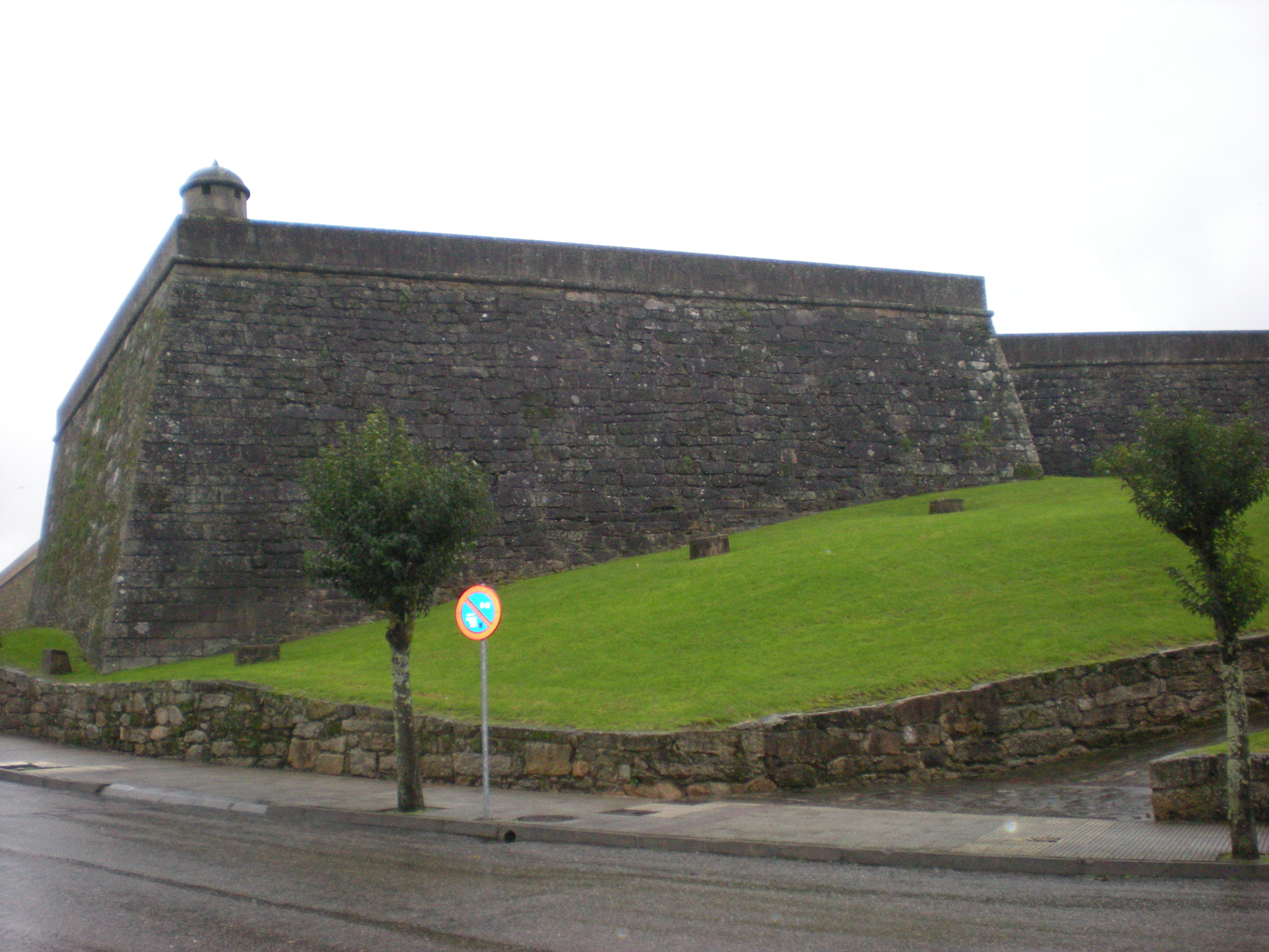 Murallas de salvaterra de miño